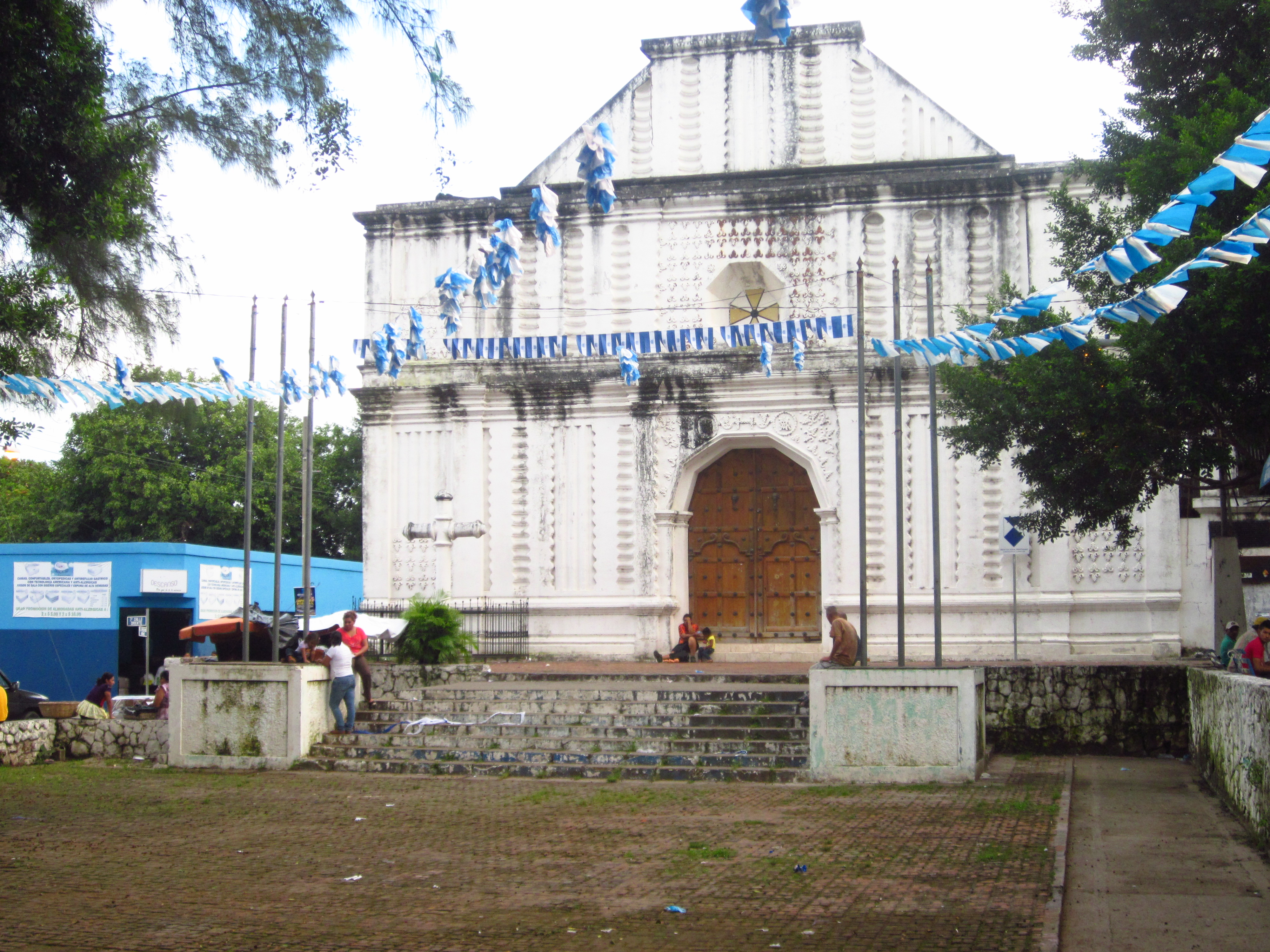 Iglesia Nuestra Señora del Pilar y plaza durante el mes cívico